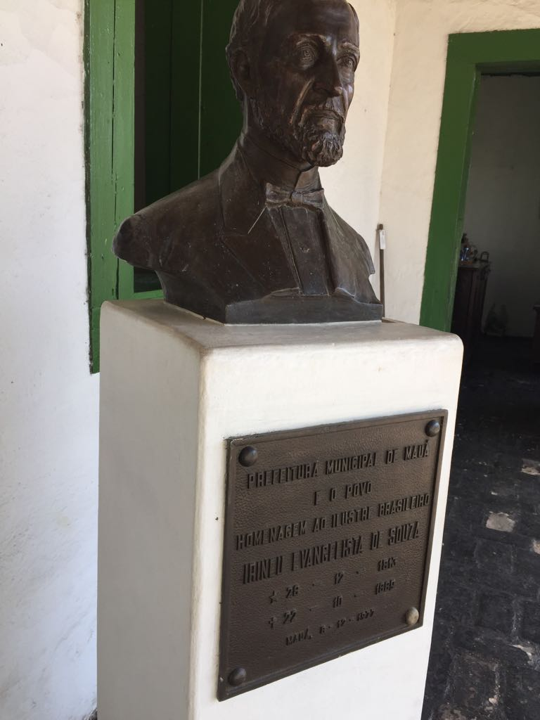 Busto de Irineu Evangelista de Souza, o Barão de Mauá Bust of Irineu Evangelista de Souza, called Barão de Mauá